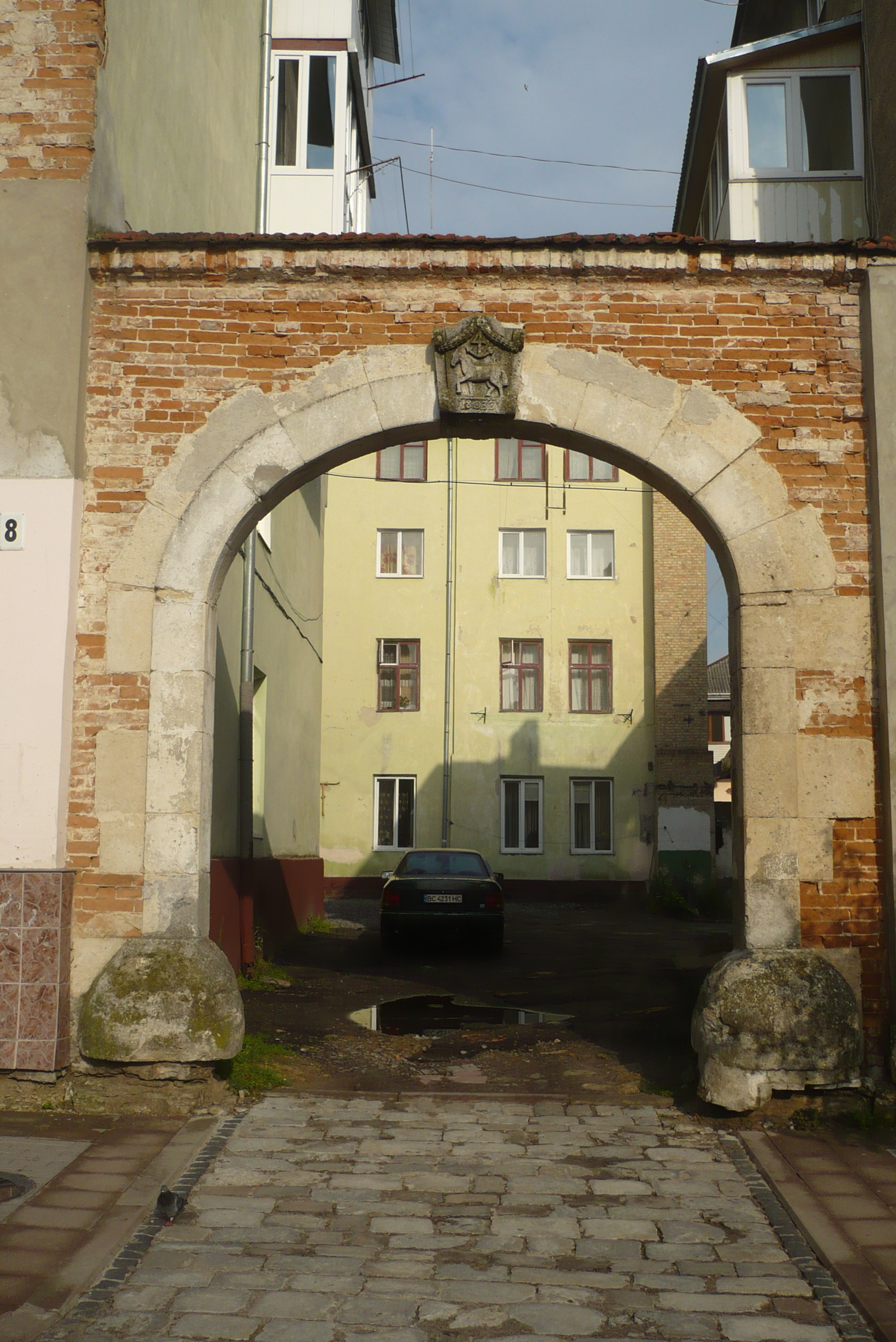 Brama w Złoczowie